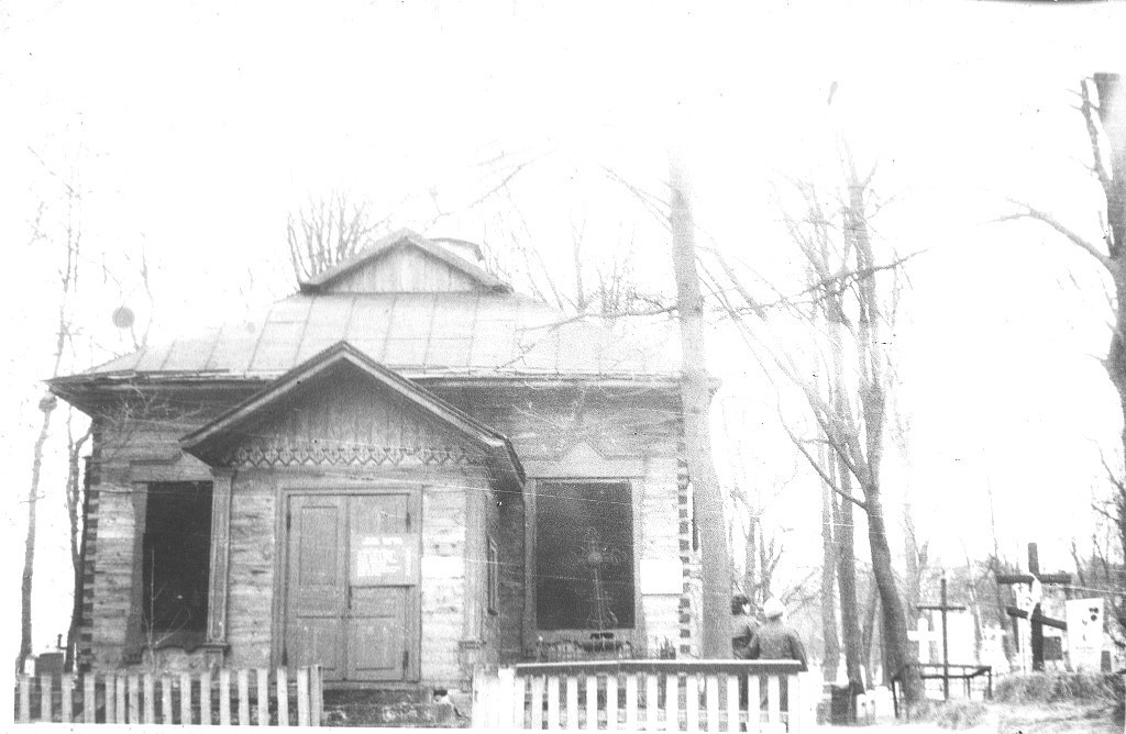 Беларуская (тарашкевіца): Спаса-Прэабражэнская царква (Пружаны)